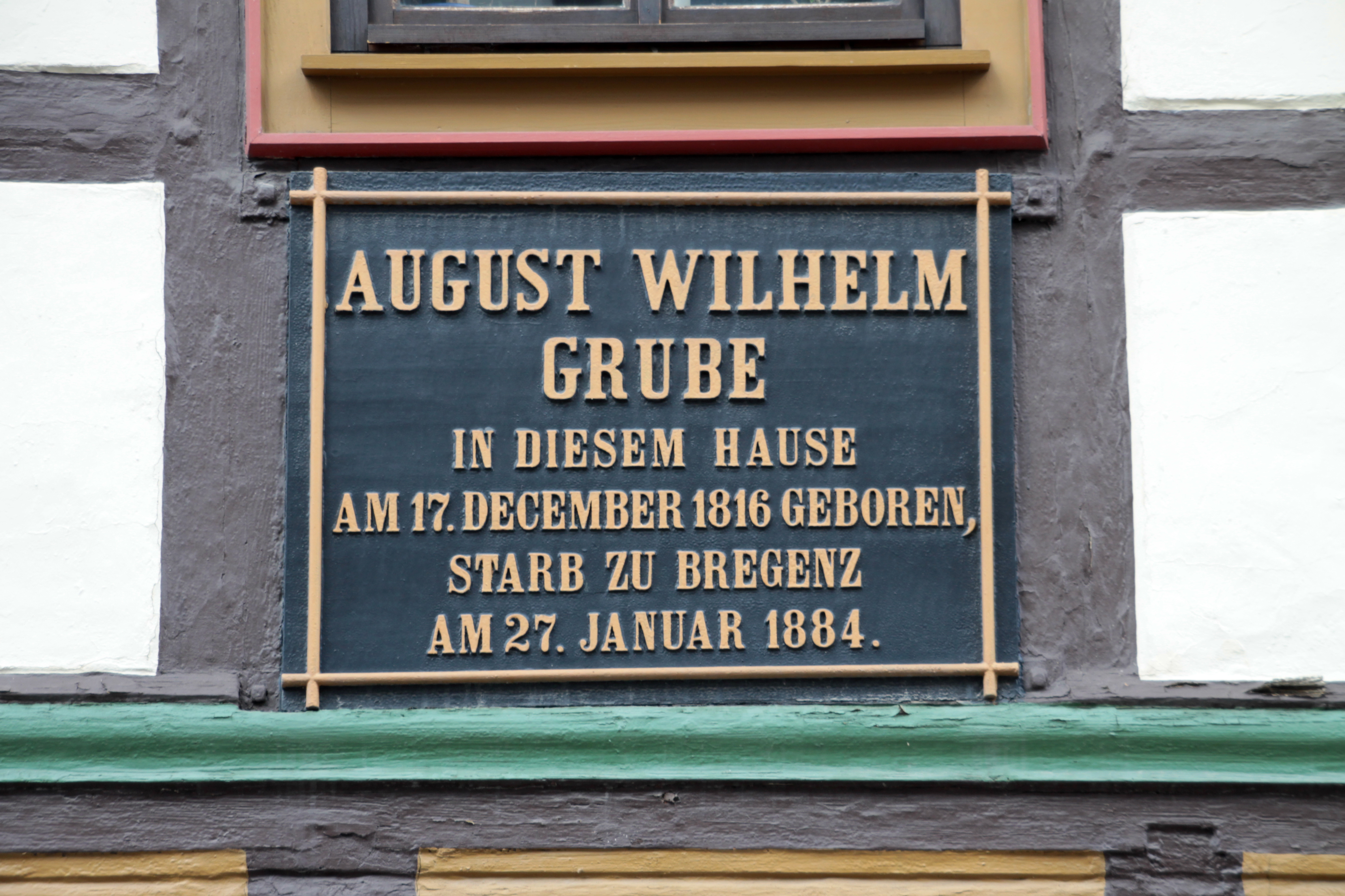 Tafel am Geburtshaus Grubes in Wernigerode, Büchtingenstraße 27